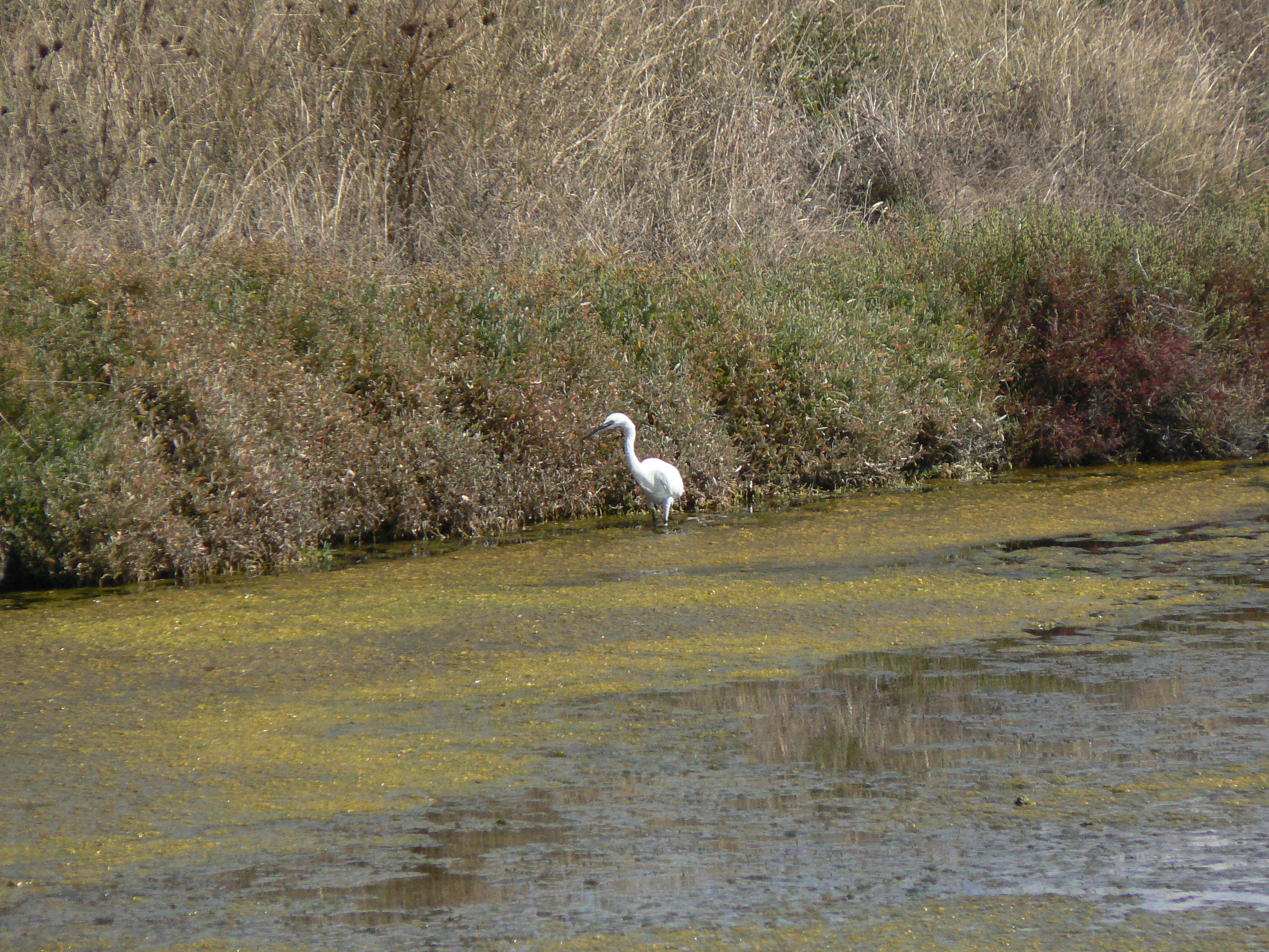 Aigrette garzette dans les marais salants de Guérande